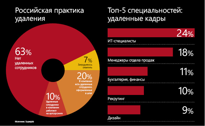 Практика удалённой работы в России